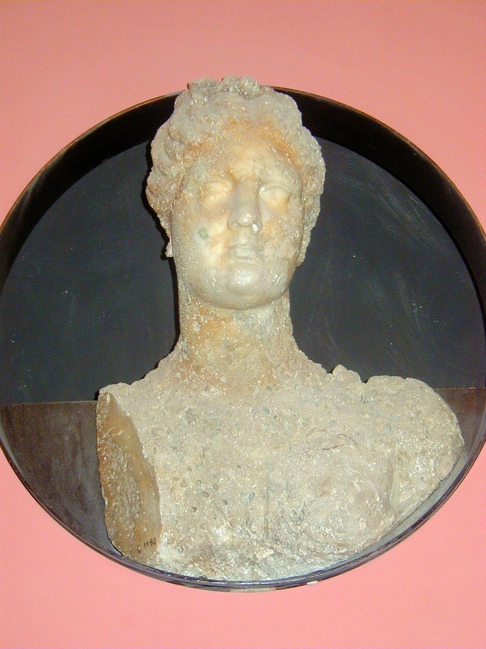 Buste d'Aphrodite, fouilles de Mahdia (Tunisie)